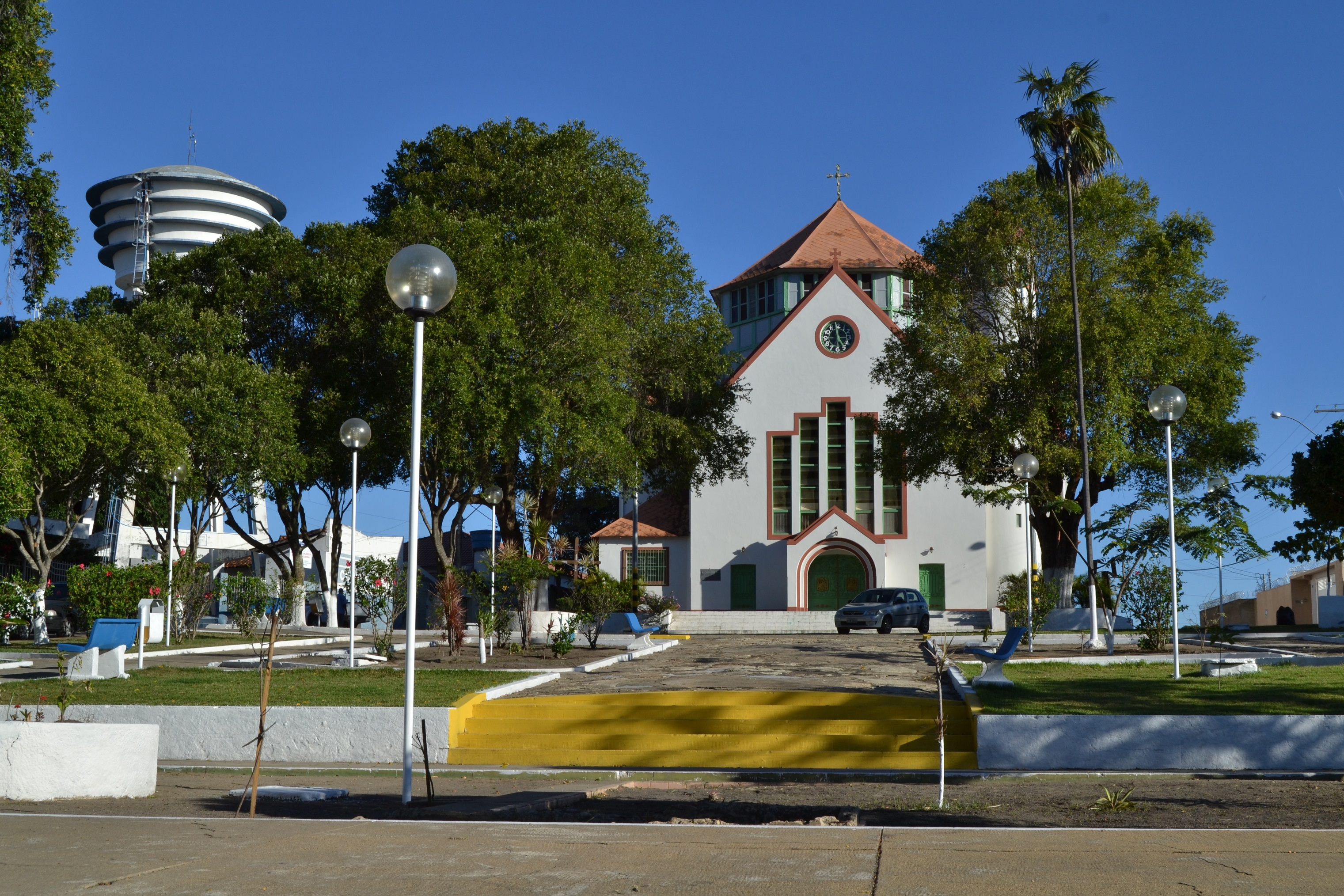 Vista da Praça Virgem da Lapa e da Paróquia São Miguel e Almas na cidade de Jequitinhonha-MG